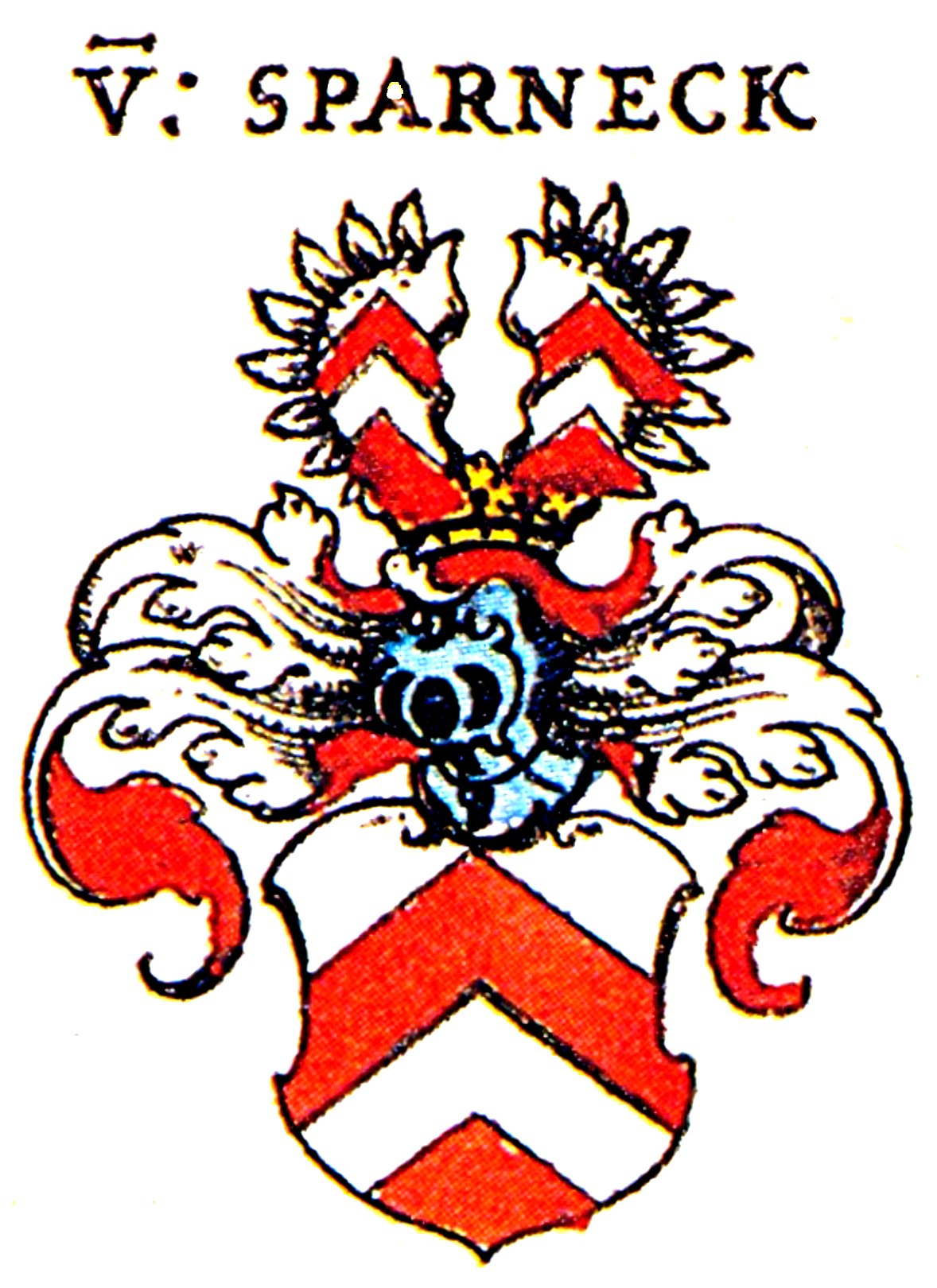 Wappen der Fränkischen Adelsfamilie Sparneck